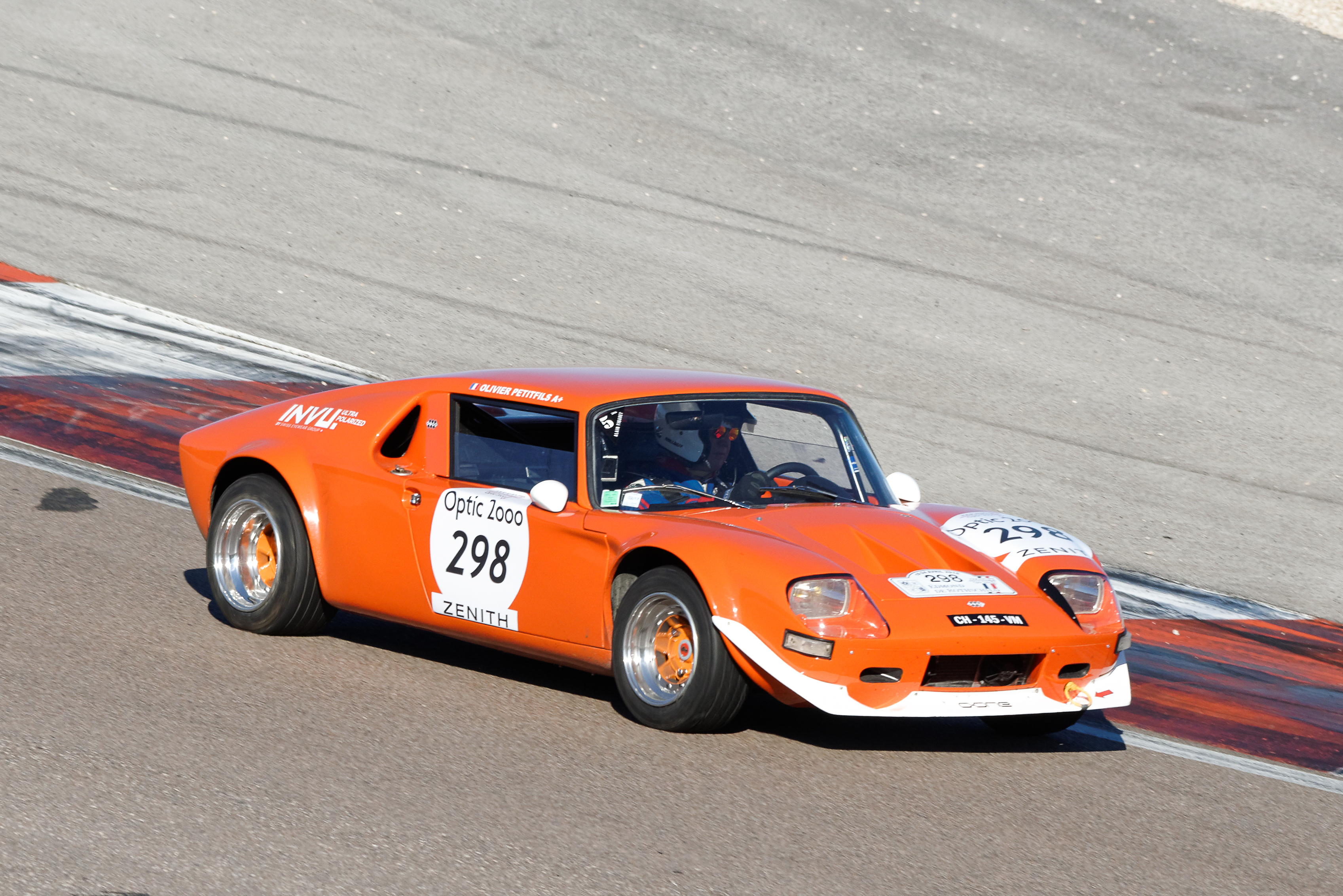 Jidé 1600 1973 - Tour Auto Optic 2000, année 2016 - Étape sur le circuit de Dijon-Prenois (Côte d'Or, Bourgogne-Franche-Comté, France).